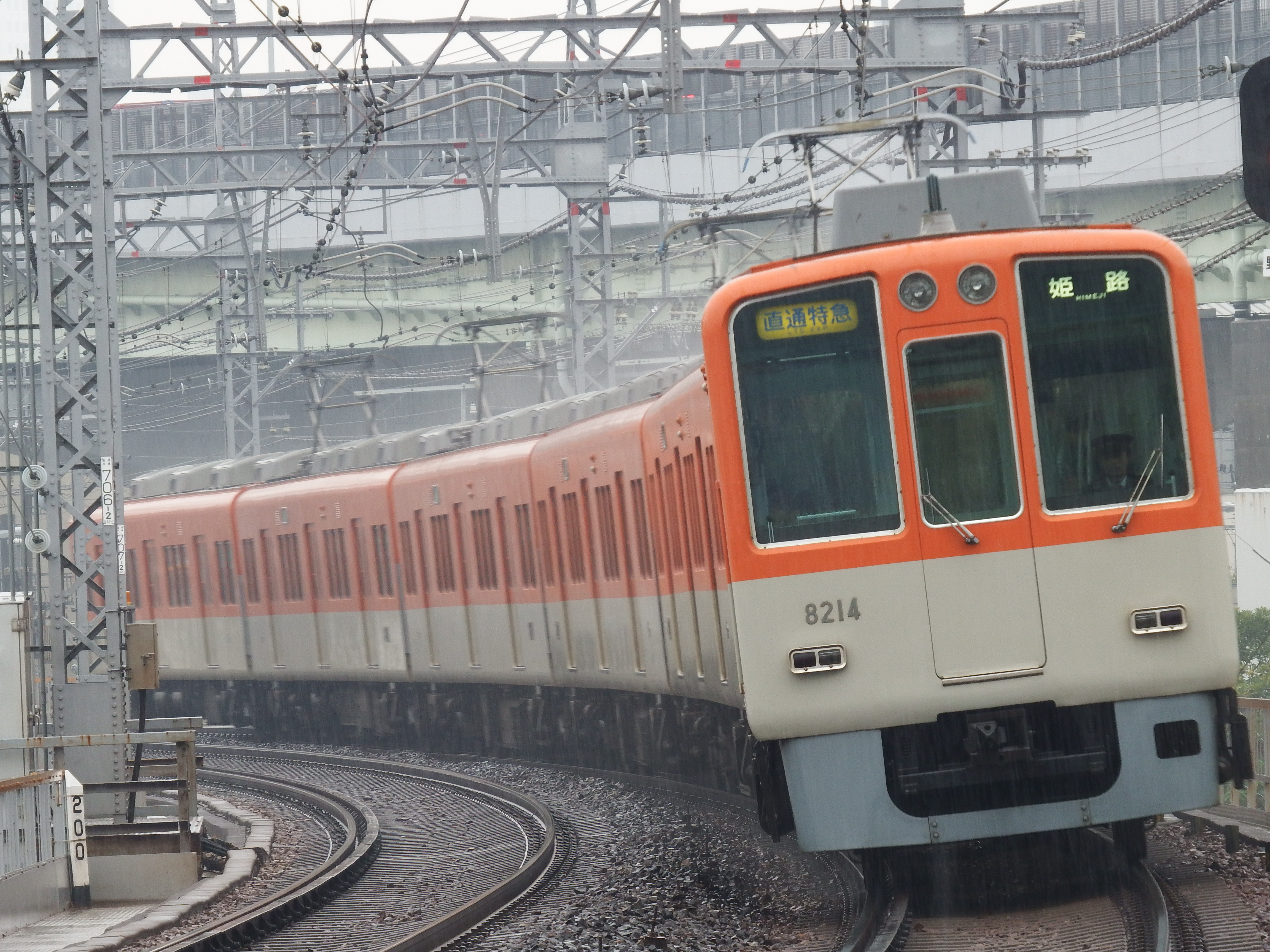 阪神８０００系タイプ2ＲＮ車です。 撮影地:淀川駅